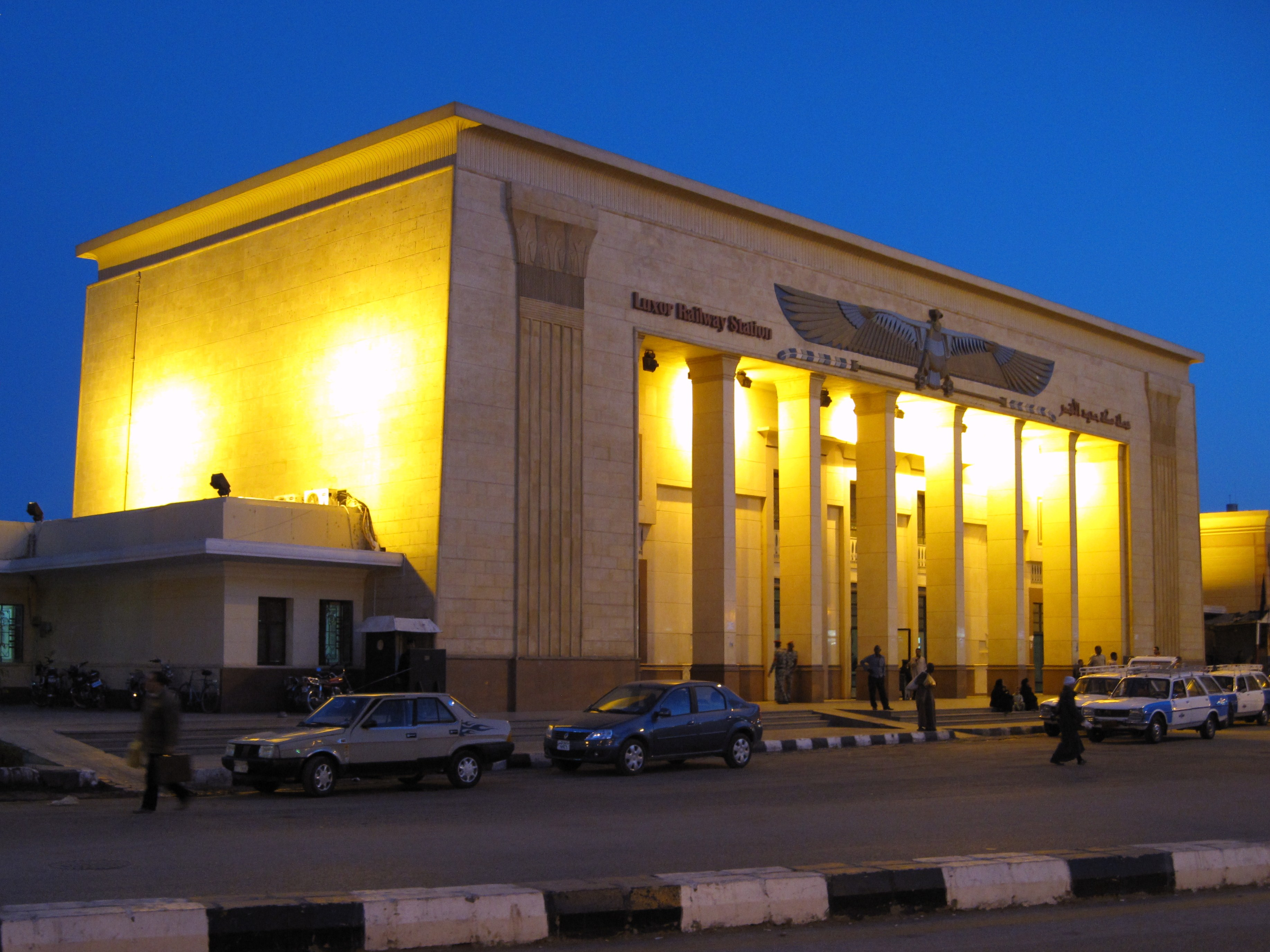 Außenansicht des Bahnhofs von Luxor, Ägypten